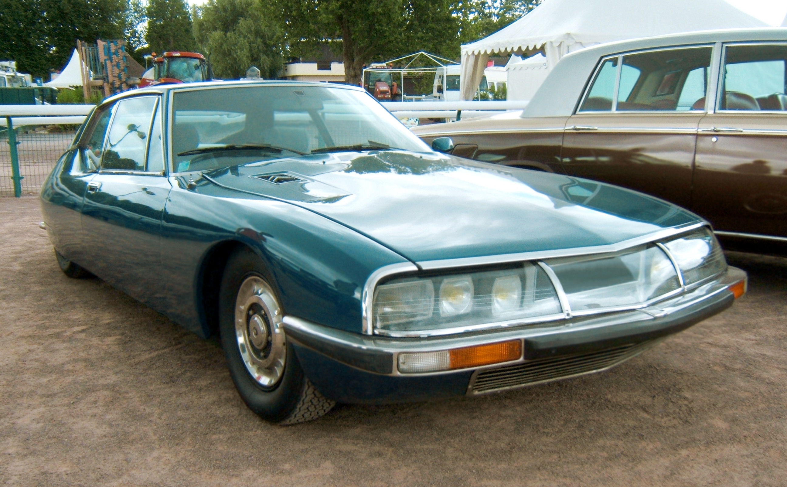 Citroën SM